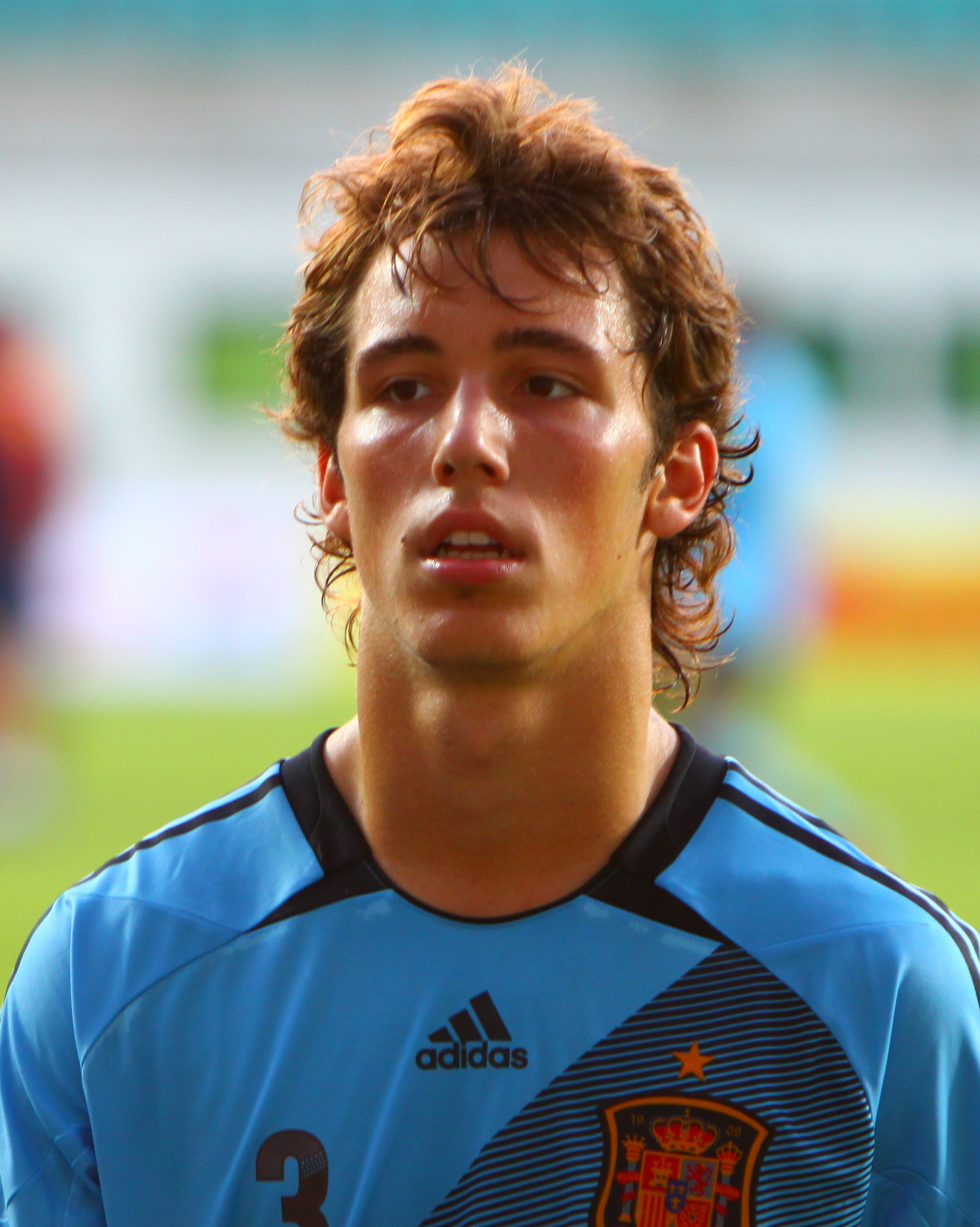 U-19 Portugal vs Spain.